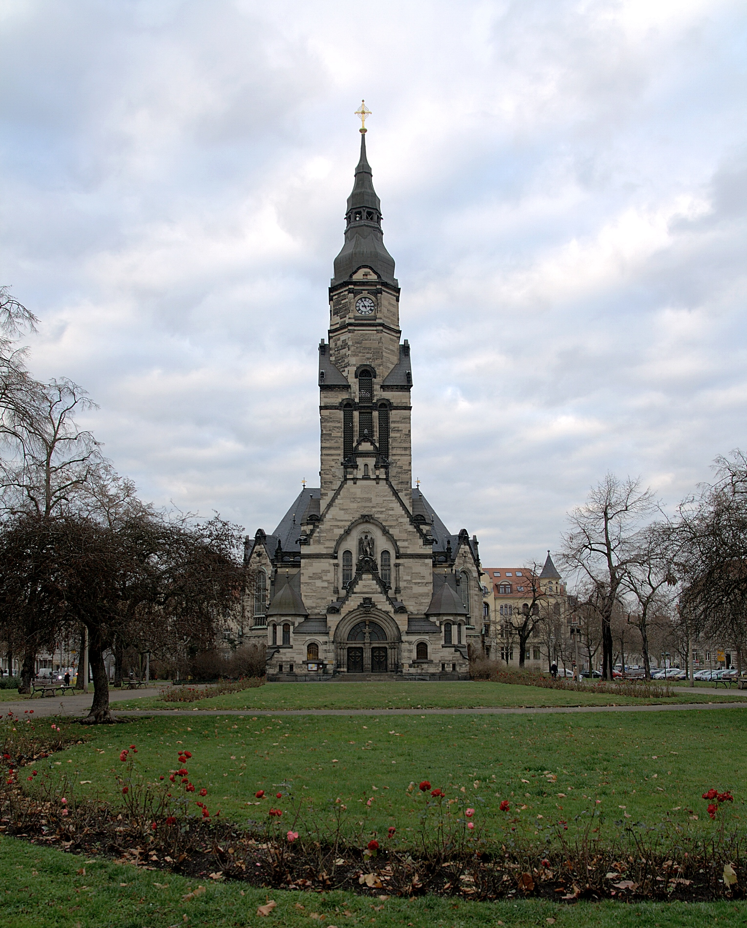 Die Ev.-Luth. Michaeliskirche auf dem Nordplatz in Leipzig.